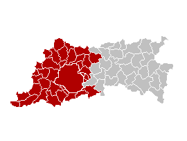 Arrondissement judiciaire de Bruxelles dans la province du Brabant flamand et la Région de Bruxelles-Capitale, Belgique. L'arrondissement judiciaire de Bruxelles comprend les arrondissements administratifs de Bruxelles-Capitale et de Hal-Vilvorde.